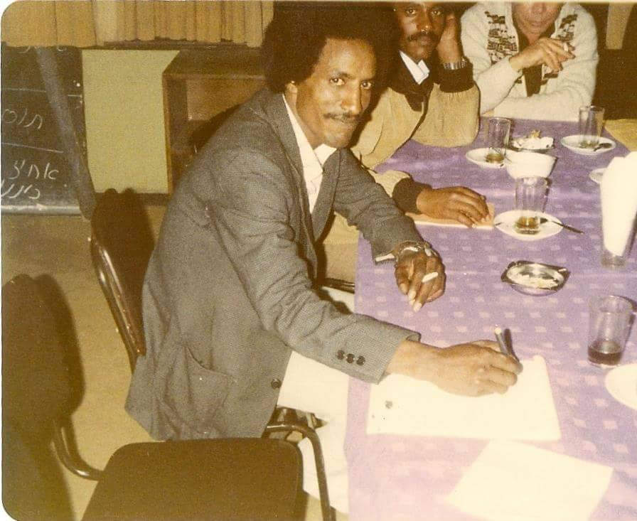 פרדה אקלום, איש חינוך יהודי-אתיופי, בין הפעילים העיקריים של העלייה מאתיופיה לישראל דרך סודאן.